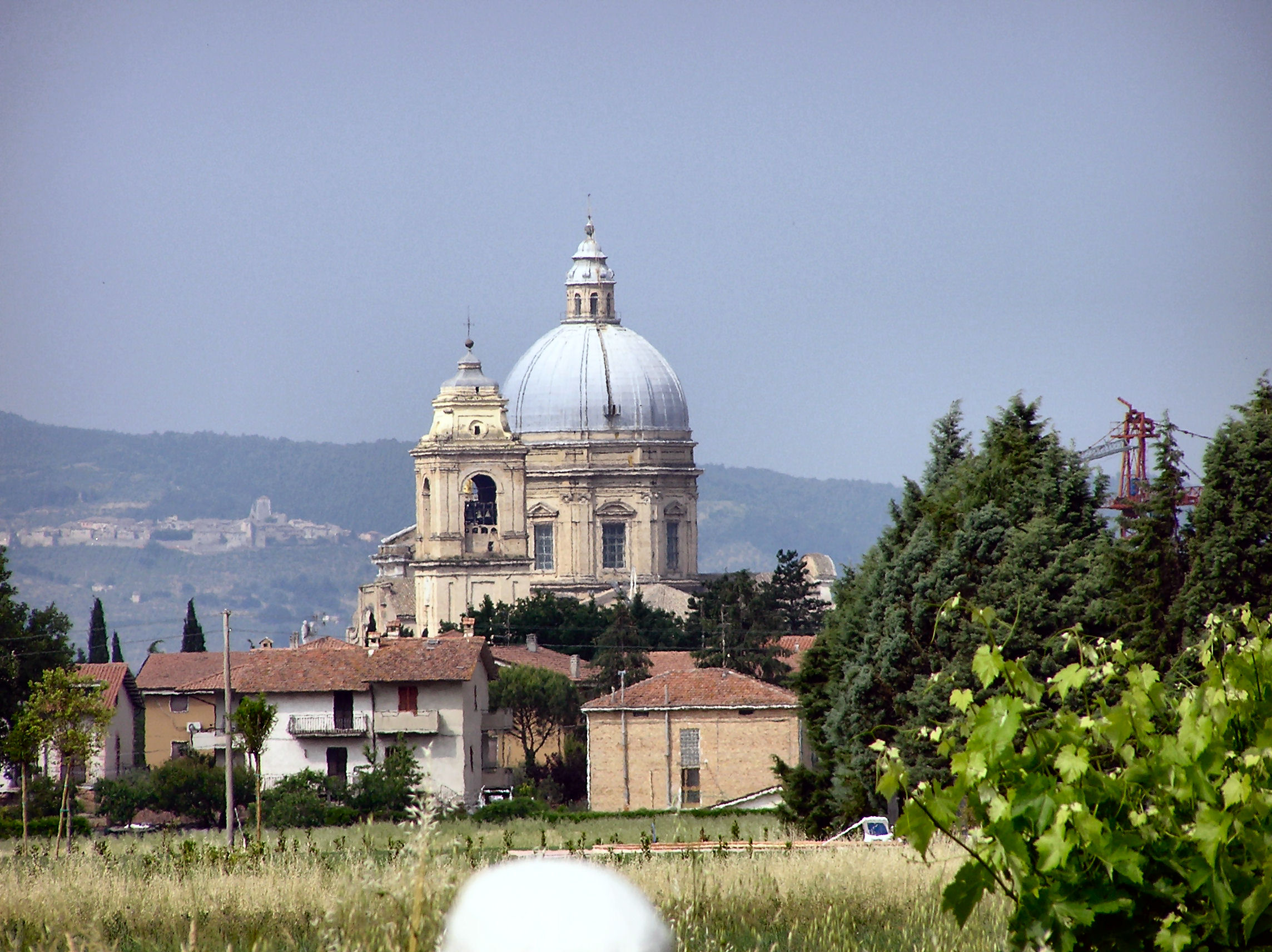 Assisi, Basilica Santa Maria degli Angeli